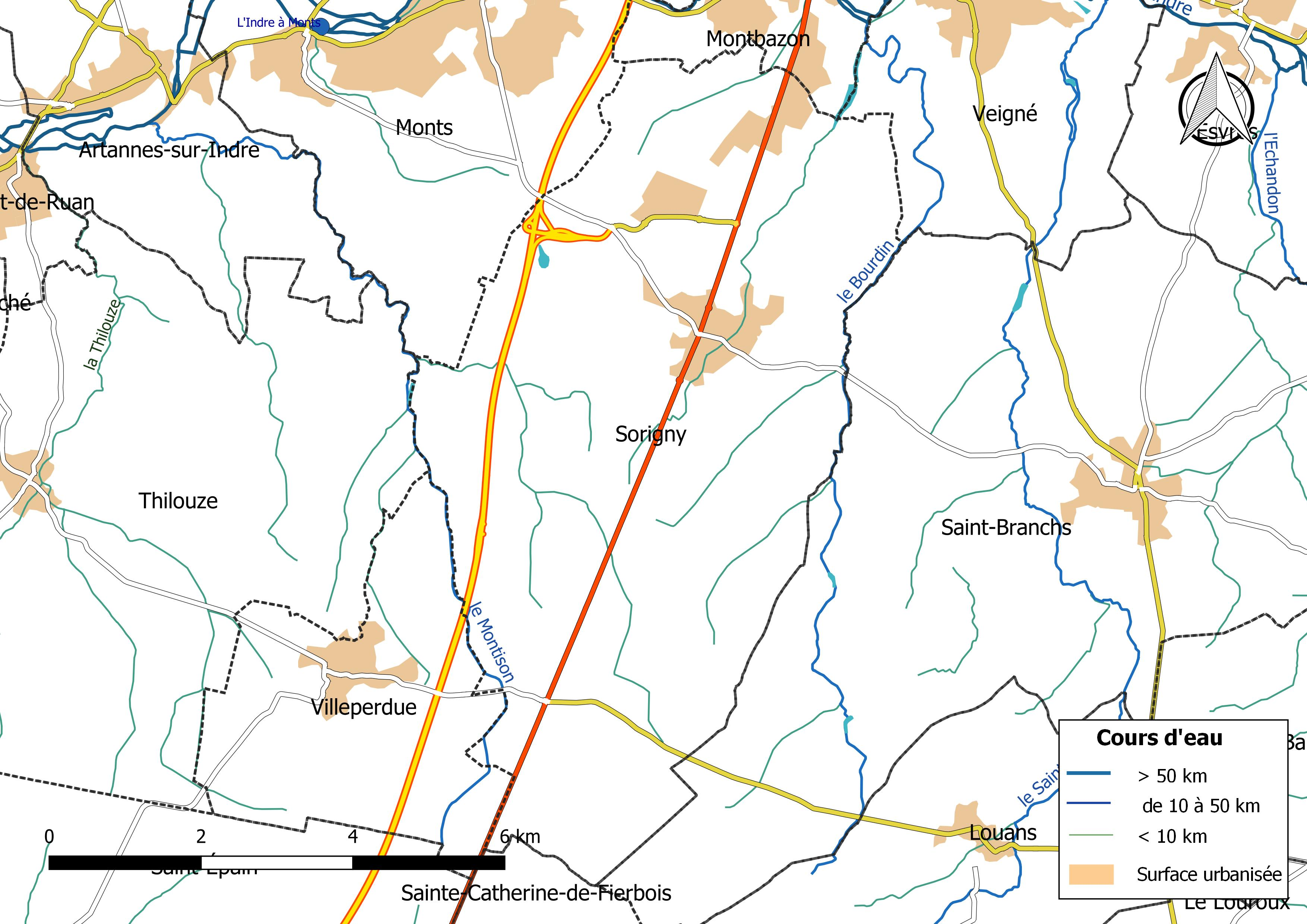 Carte du réseau hydrographique de la commune de Sorigny (France).